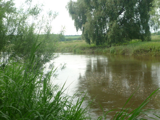 BodLöd